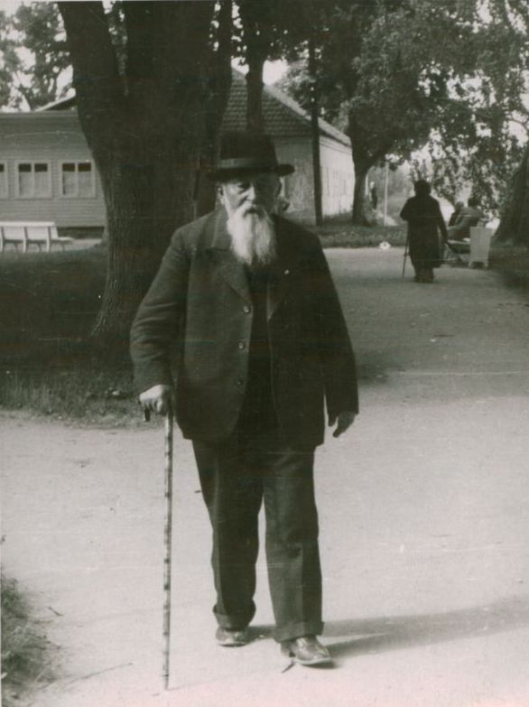 Martynas Jankus in Birštonas